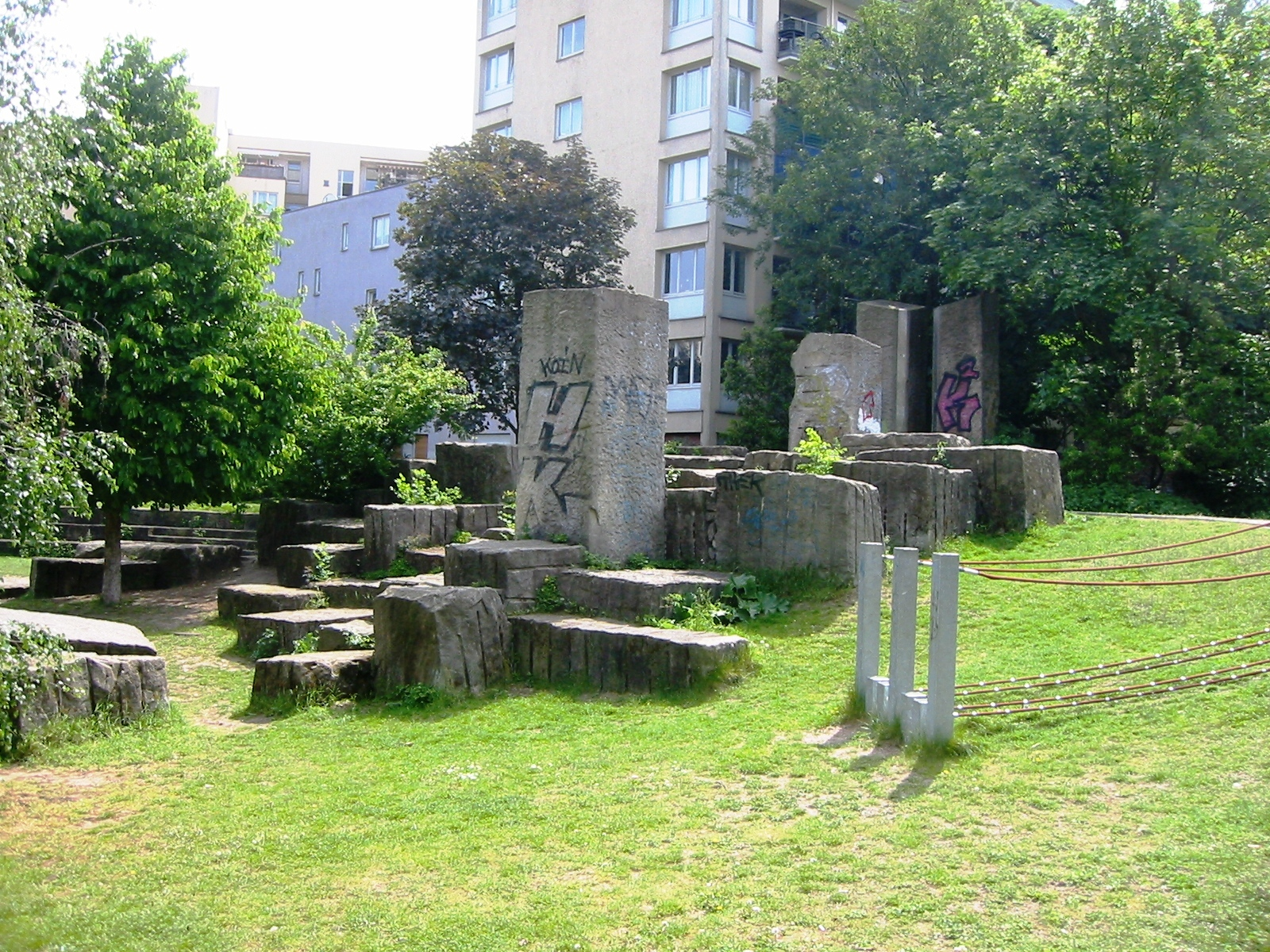 Steinskulpturen im Kurt-Hiller-Park in Berlin-Schöneberg